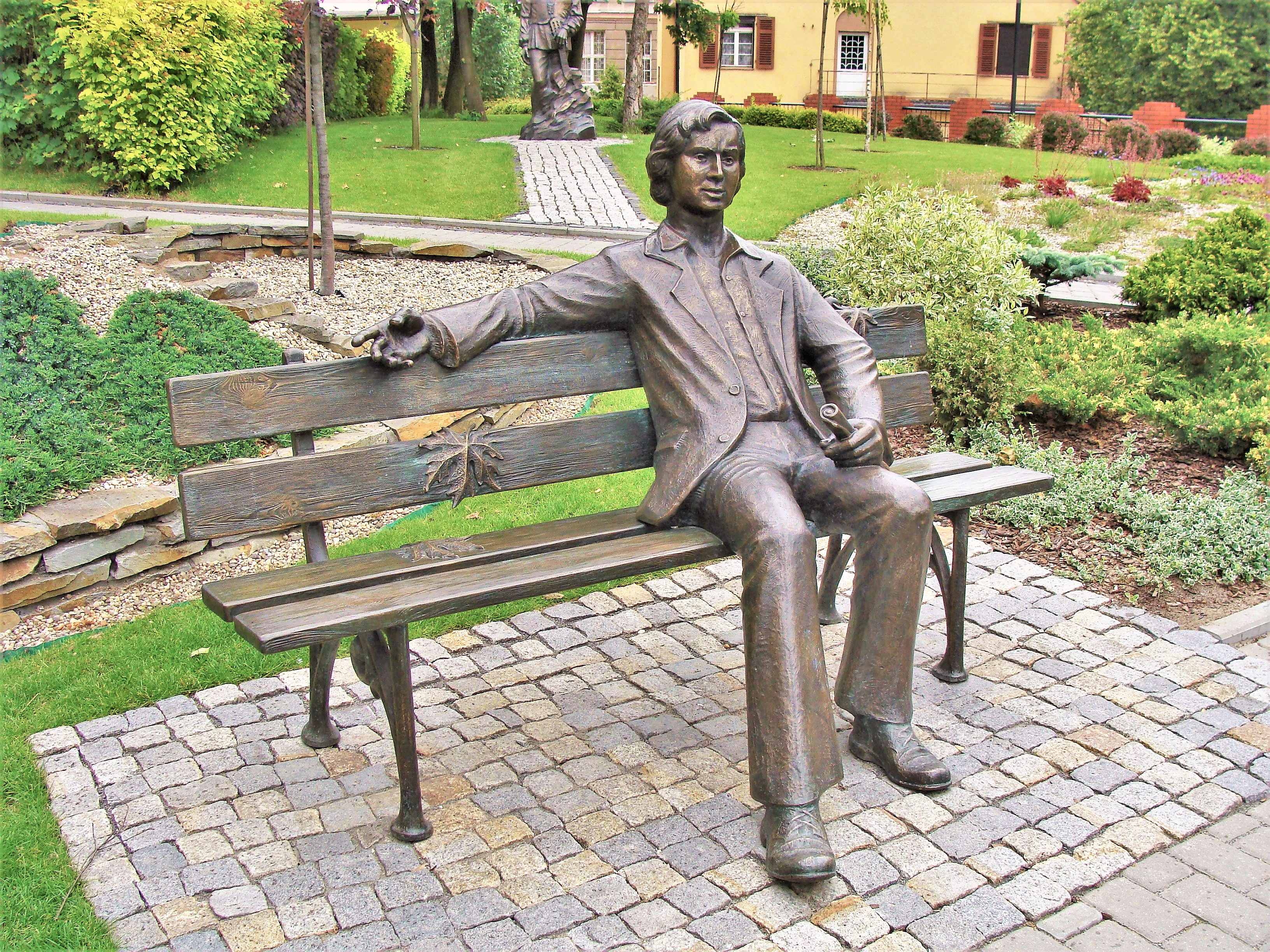 Marek Grechuta. Wzgórze Uniwersyteckie w Opolu. Autor projektu: Wit Pichurski. Odlew: Wiktor Chalupczok.